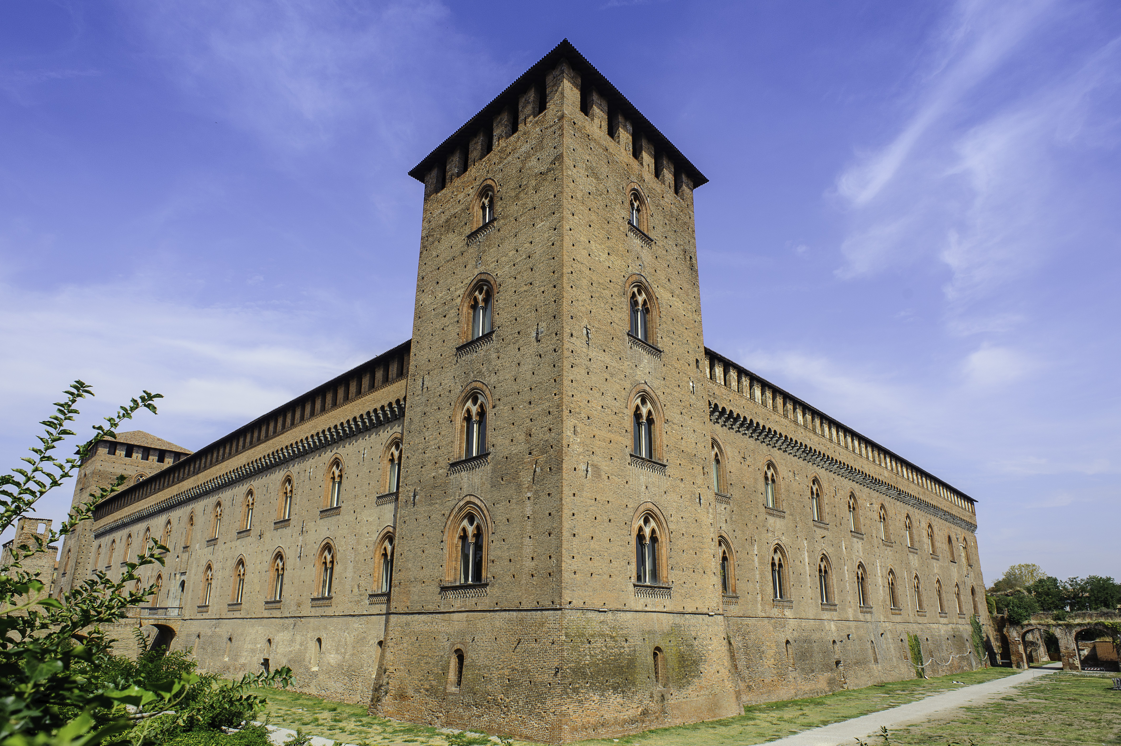 Castello Visconteo di Pavia This is a photo of a monument which is part of cultural heritage of Italy.